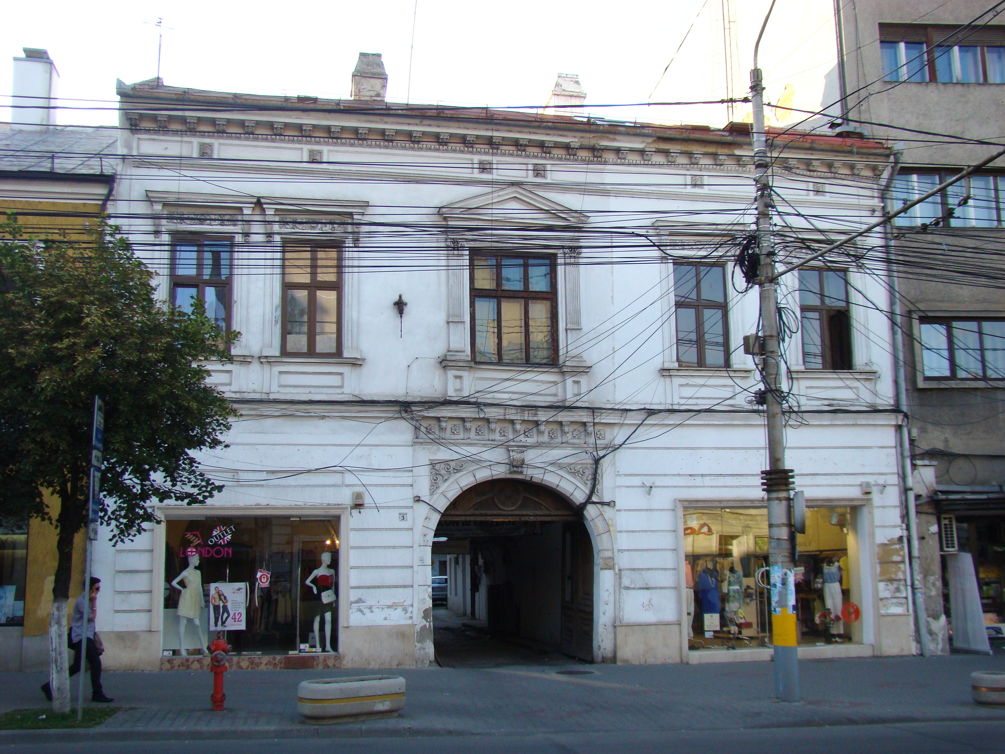 Casă, monument istoric, Bd.21 Decembrie 1989, nr.3